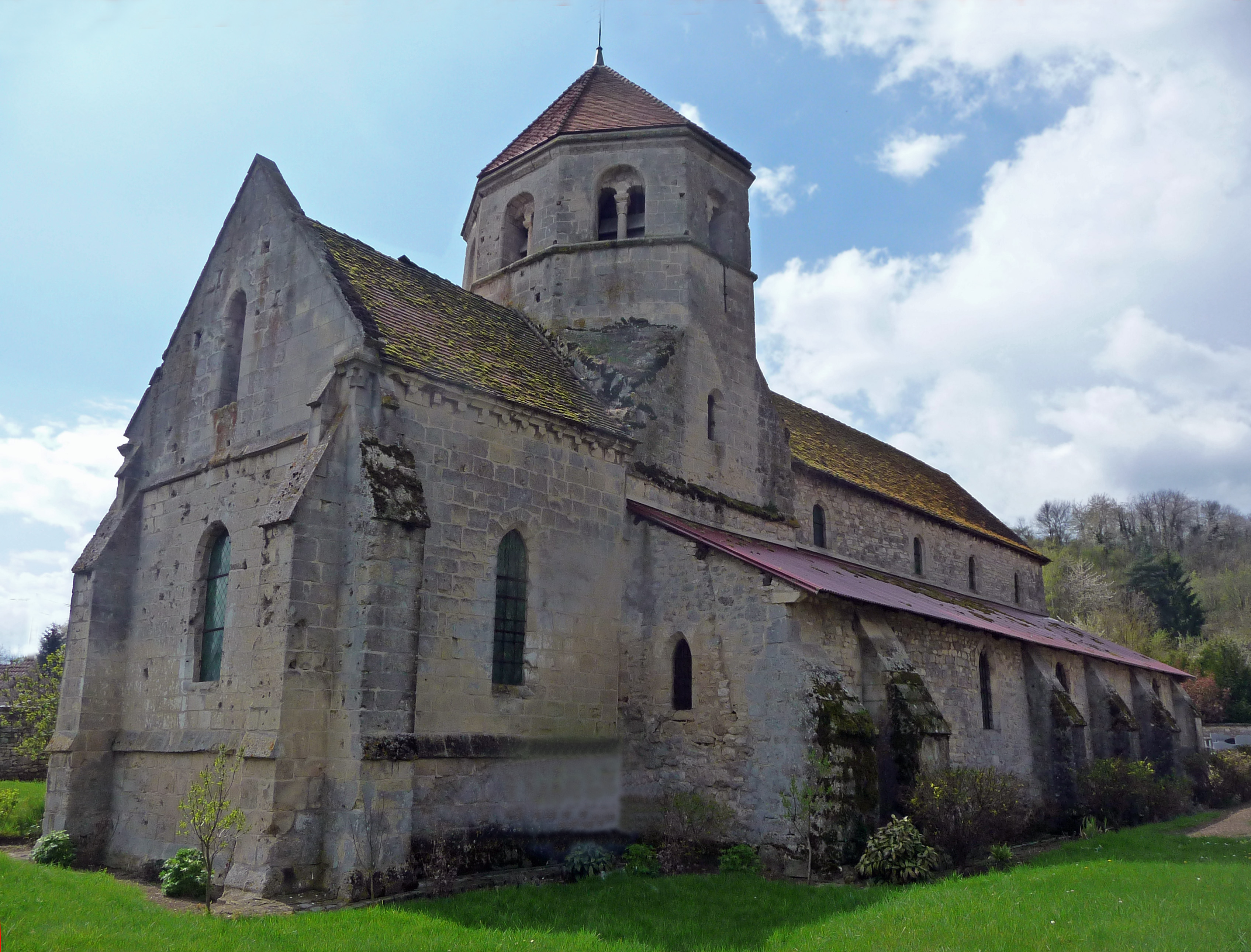 Edifice roman subsistant de l'ancien prieuré